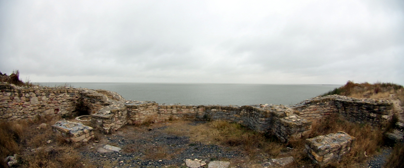 Cetatea Orgame- Argamum - vedere spre lacul Razim 02